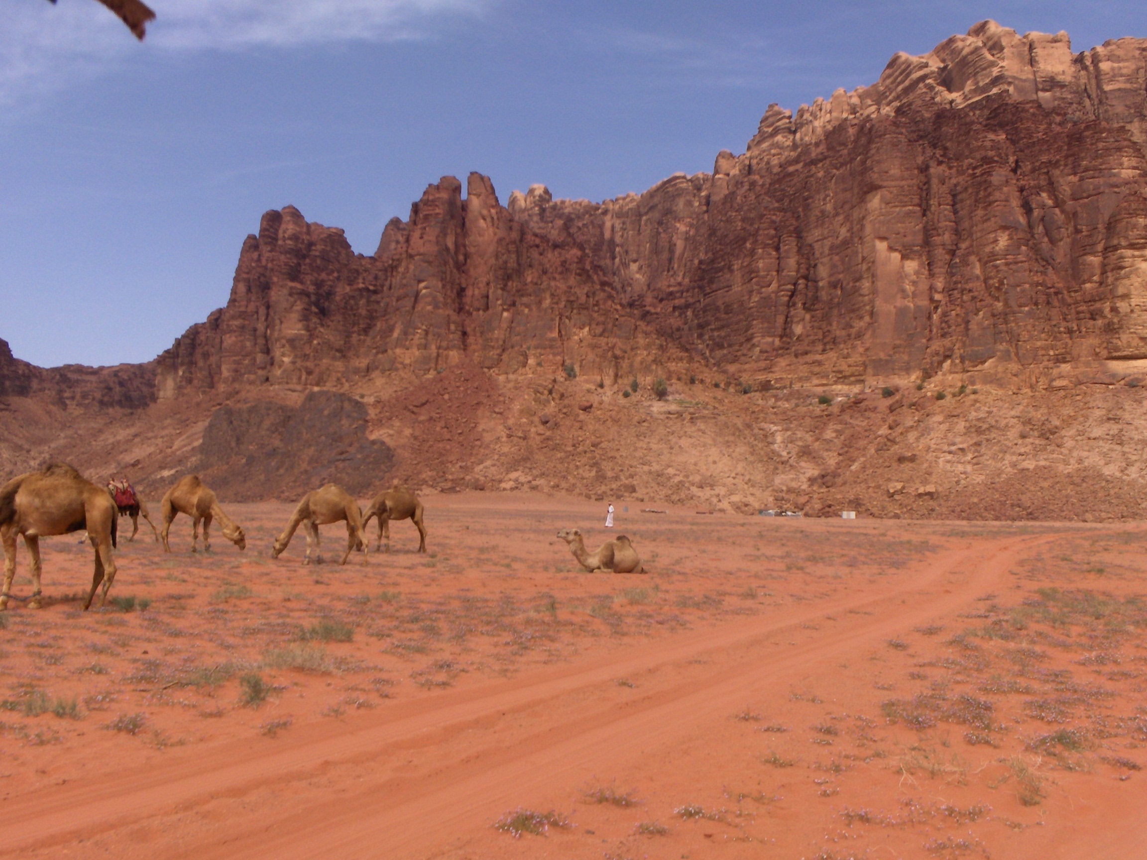 Dromedari al pascolo nel Wadi Rum